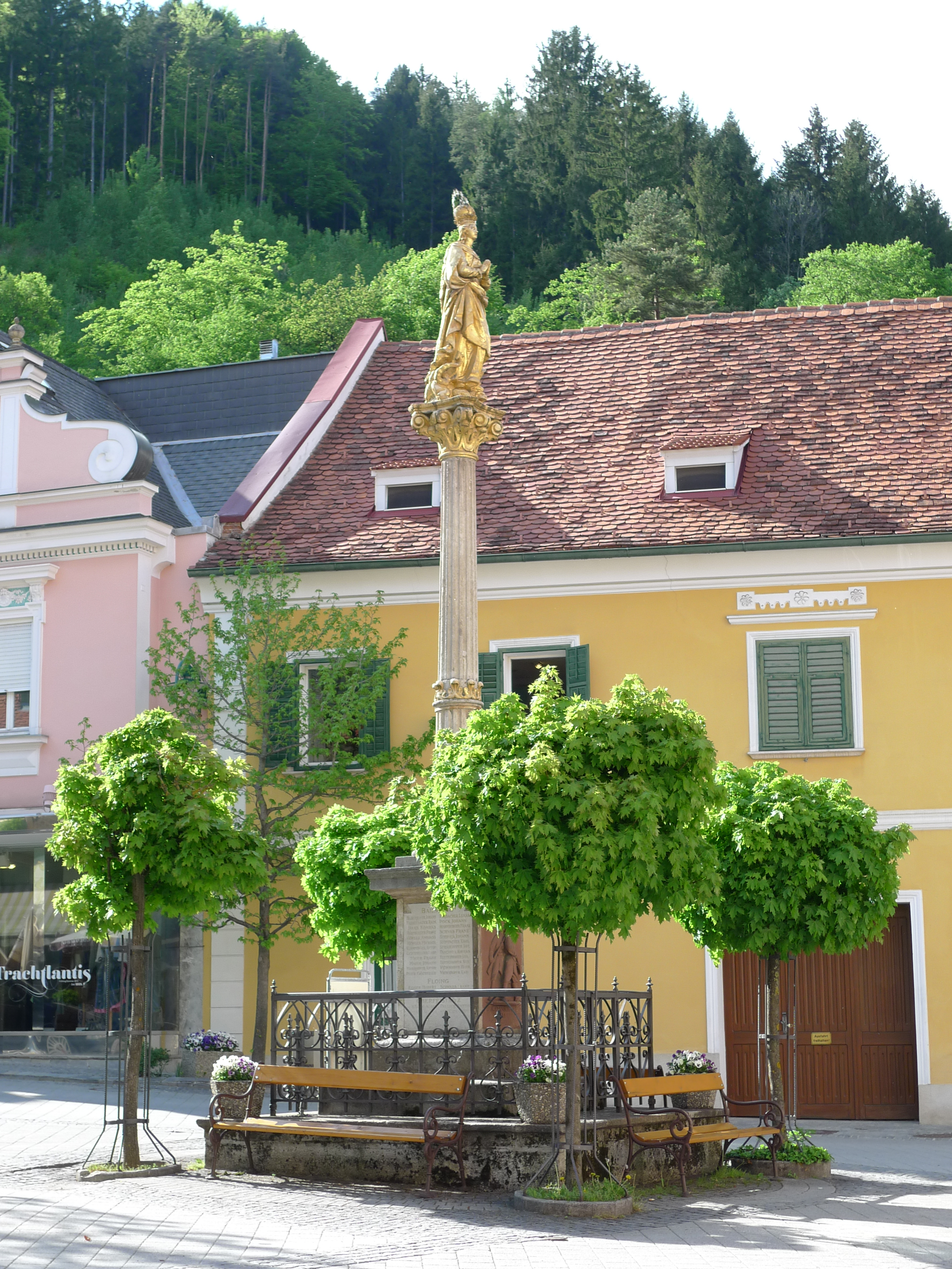 Mariensäule Anger Steiermark.